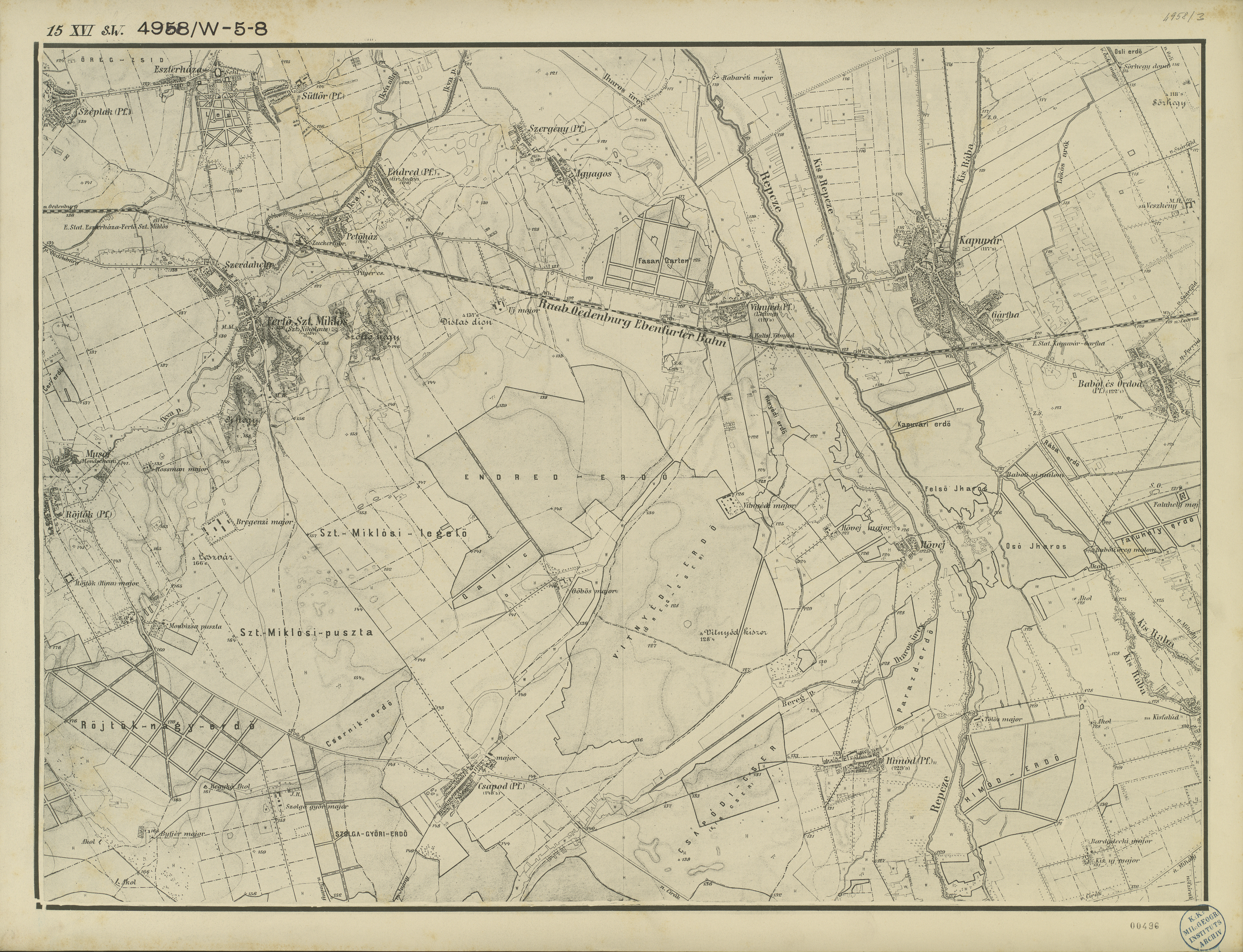 historische Landkarte: Arbeitsfassung von: Gradkartenblatt Zone 15 Colonne XVI Section SW (Südwest) (später 4958/3 oder 4958-W-5-8). Fertö Szt Miklós / St Nikolaus, Esterháza, Kapuvar in Westungarn. Franzisco-josephinische (3.) Landesaufnahme der österreichisch-ungarischen Monarchie. Maßstab 1:25.000. Keine Angaben über den Stand (nicht vor dem Bau der 1876 eröffneten Raab-Ödenburg-Ebenfurther Eisenbahn, aber vor dem Bau der 1897 eröffneten Neusiedler-See-Bahn).